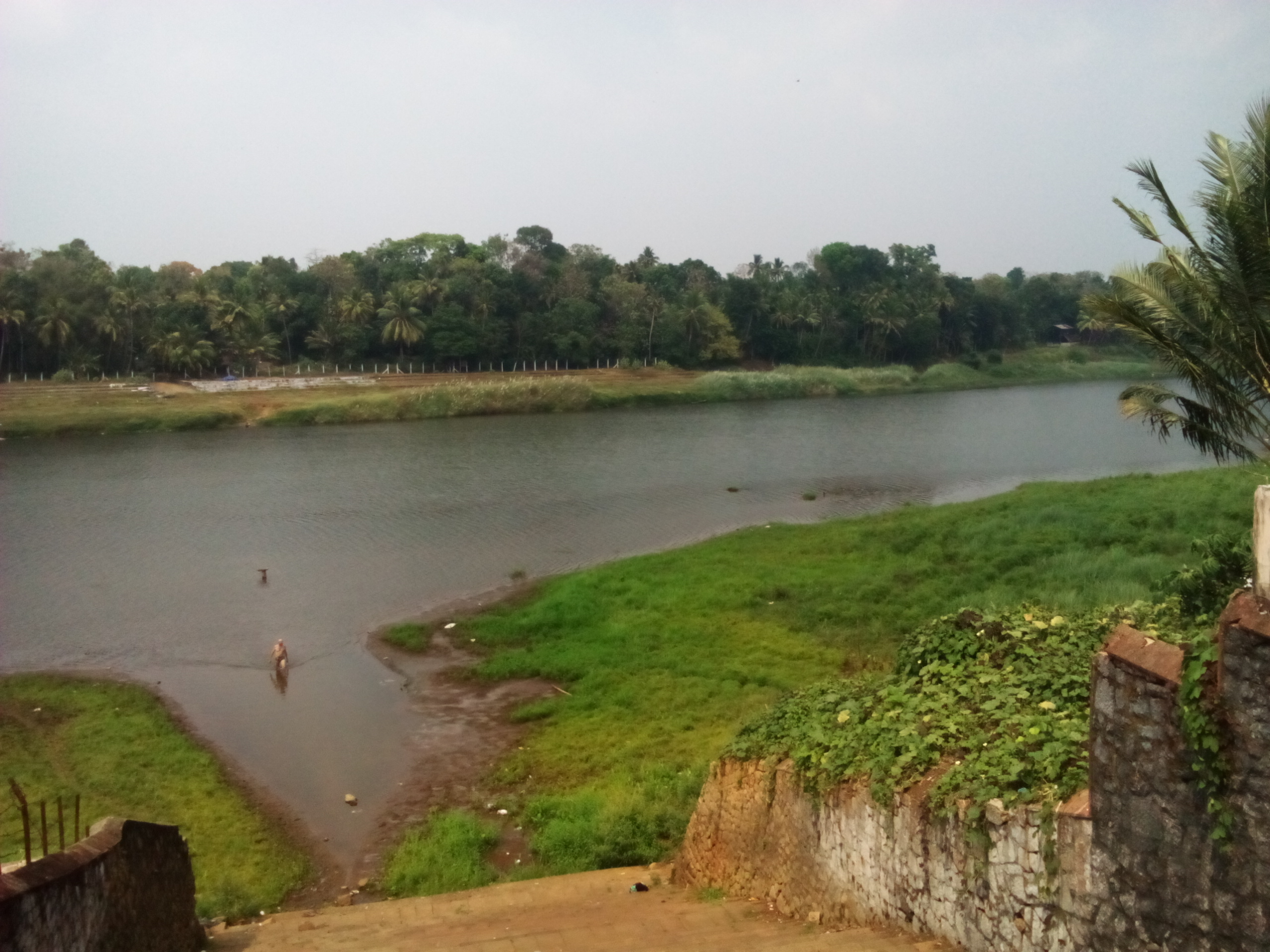 pamba river, aranmula, kerala